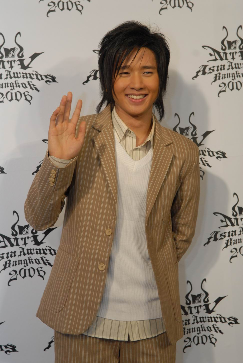 โต๋ ศักดิ์สิทธิ์ เวชสุภาพร งานเอ็มทีวี เอเชีย อวอร์ดส 2006 หลังเวที